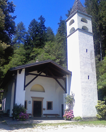 Santuario Madonna del Feles nel comune di Bosentino (Trento)